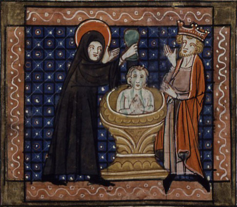 Baptême de Sigebert III par Jacobus De Voragine et Richard De Montbaston, legenda aurea, 1348. Traduction Jean De Vignay. Français 241, fol. 68v.